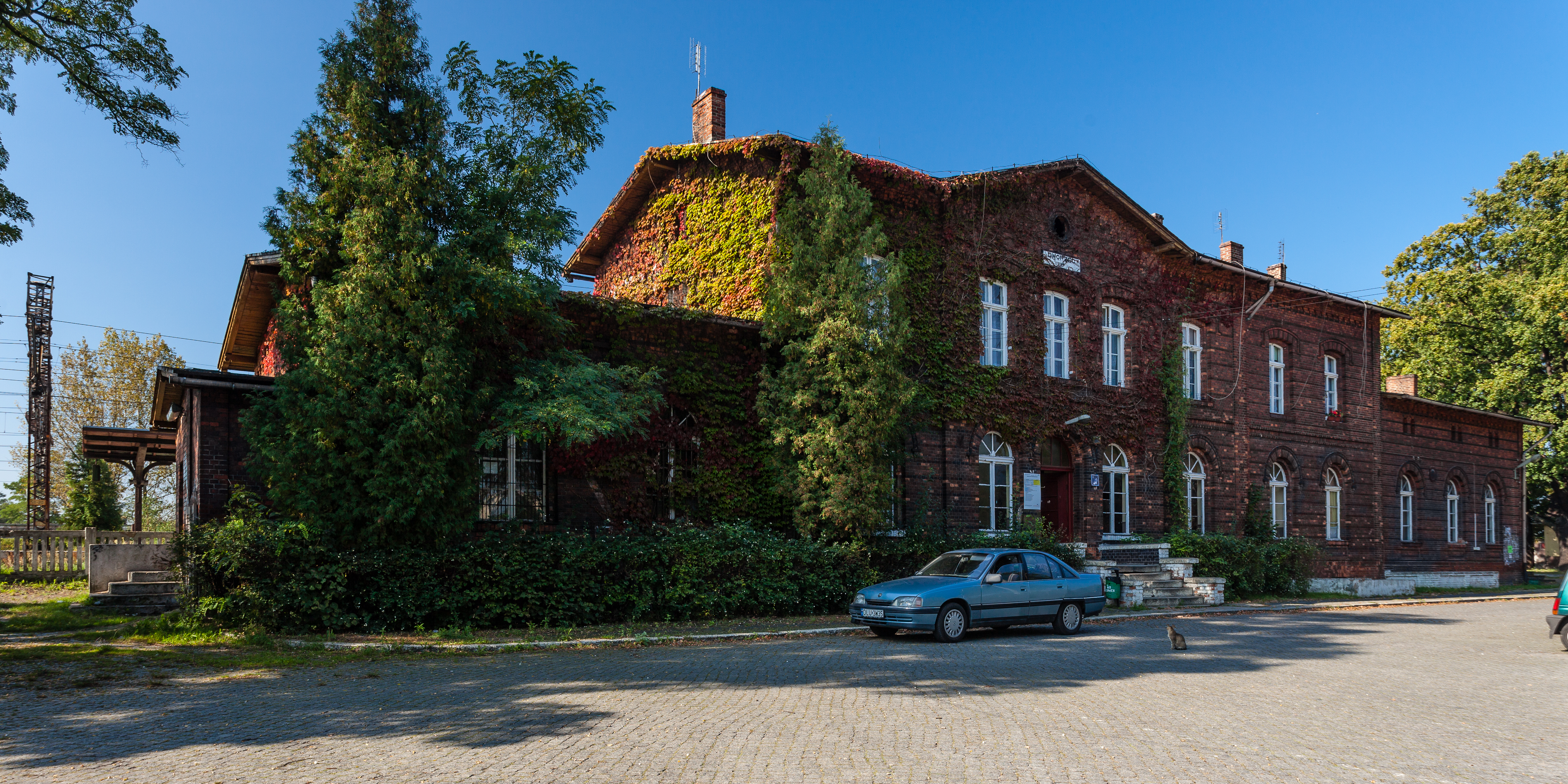 Ścinawa, ul. Kościuszki 21 - zespół dworca PKP: dworzec